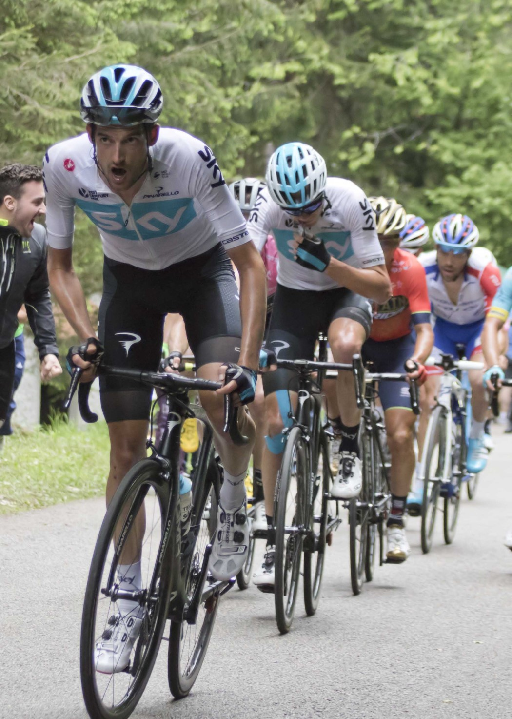 GIR10013 poels froome